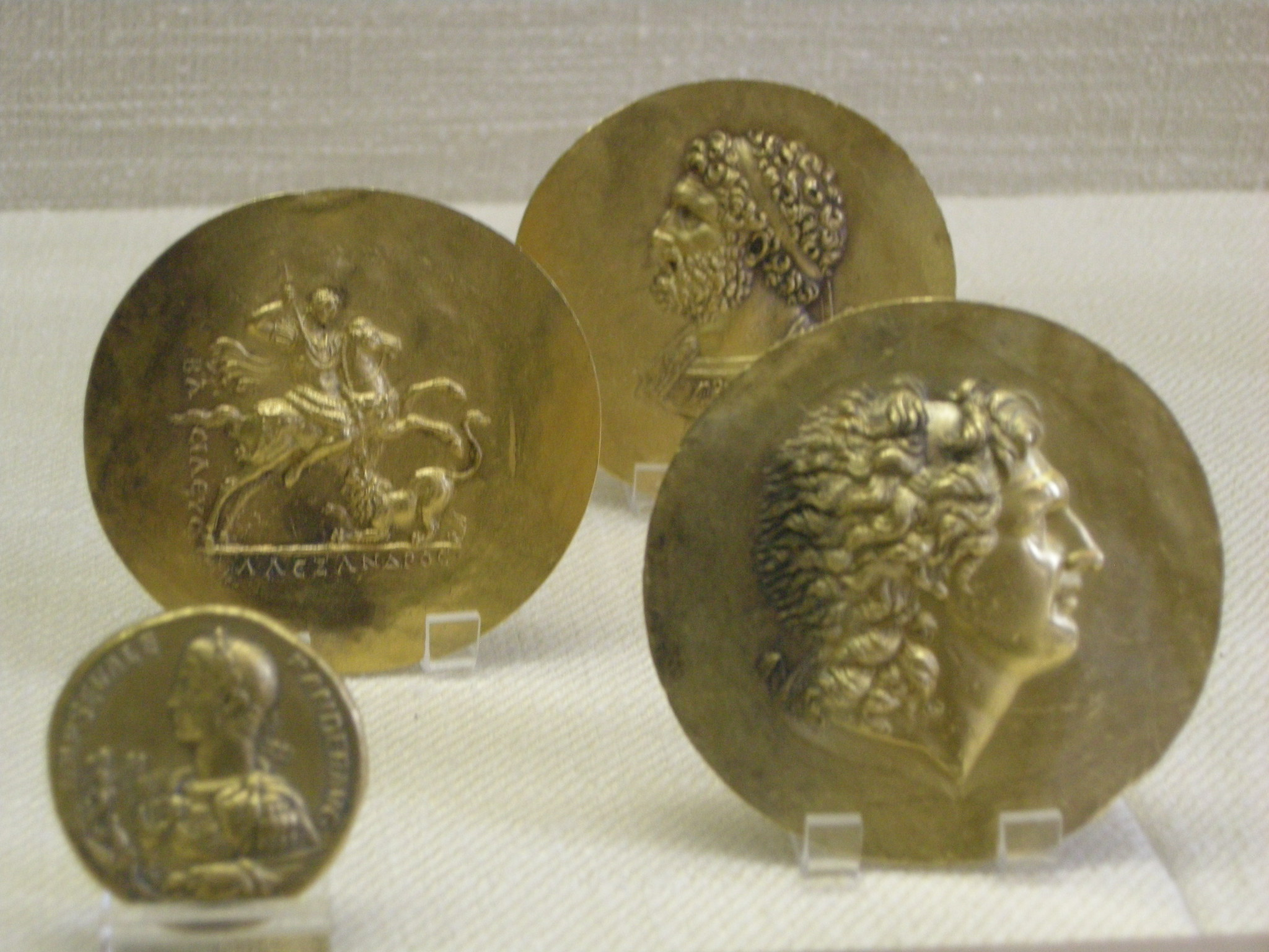 CdM, tesoro di tarso, multiplo d'oro di alessandro severo (230 c.) e medaglioni con le effigi di alessandro magno e di filippo il macedone